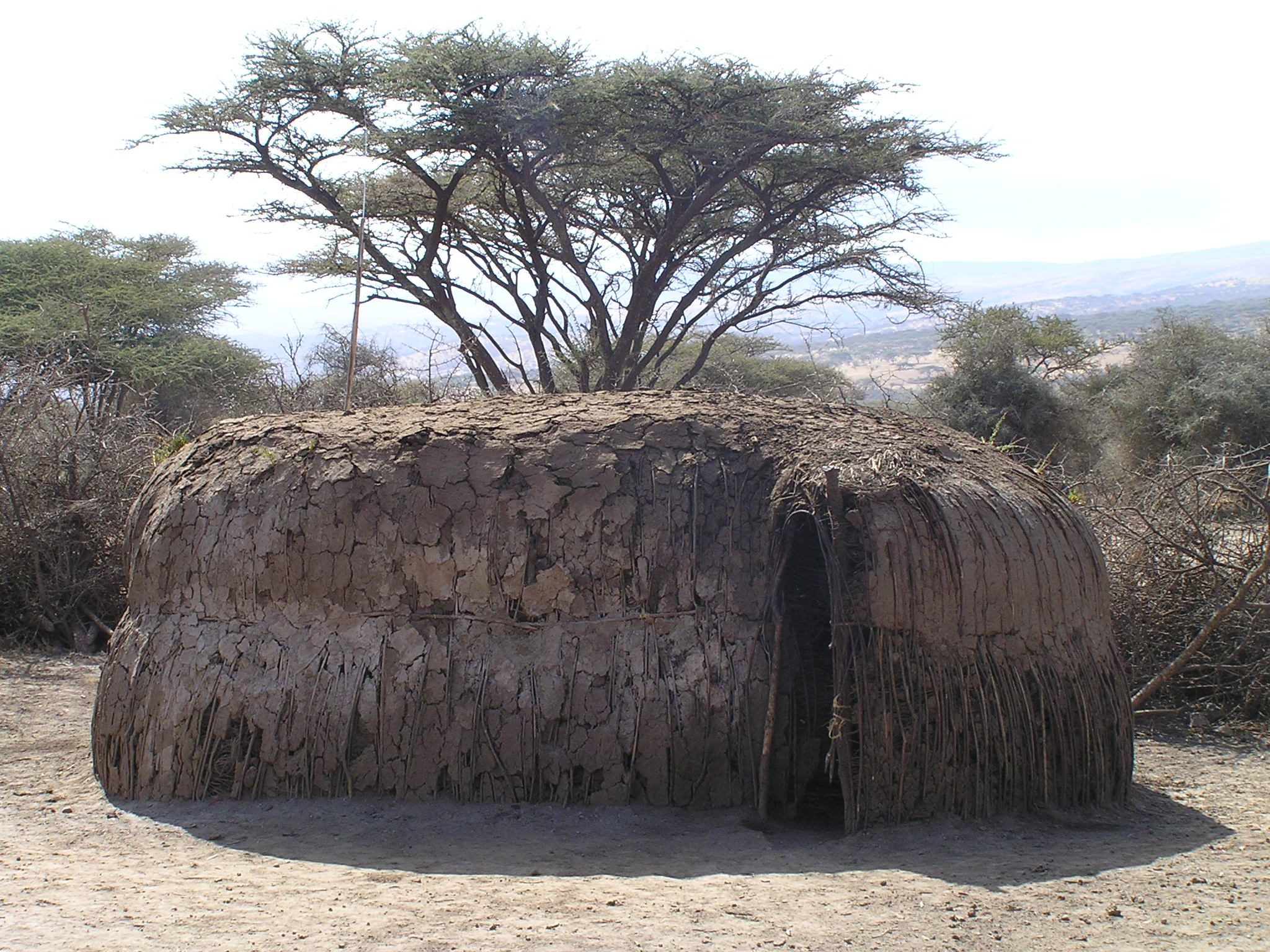 Het huis van Masaï